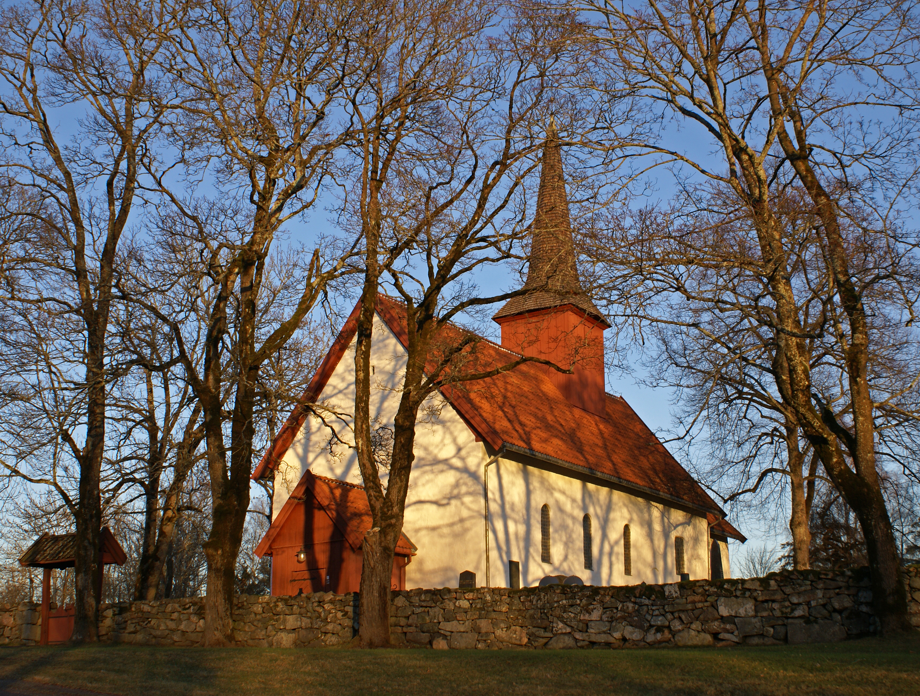 Tanum church, Bærum